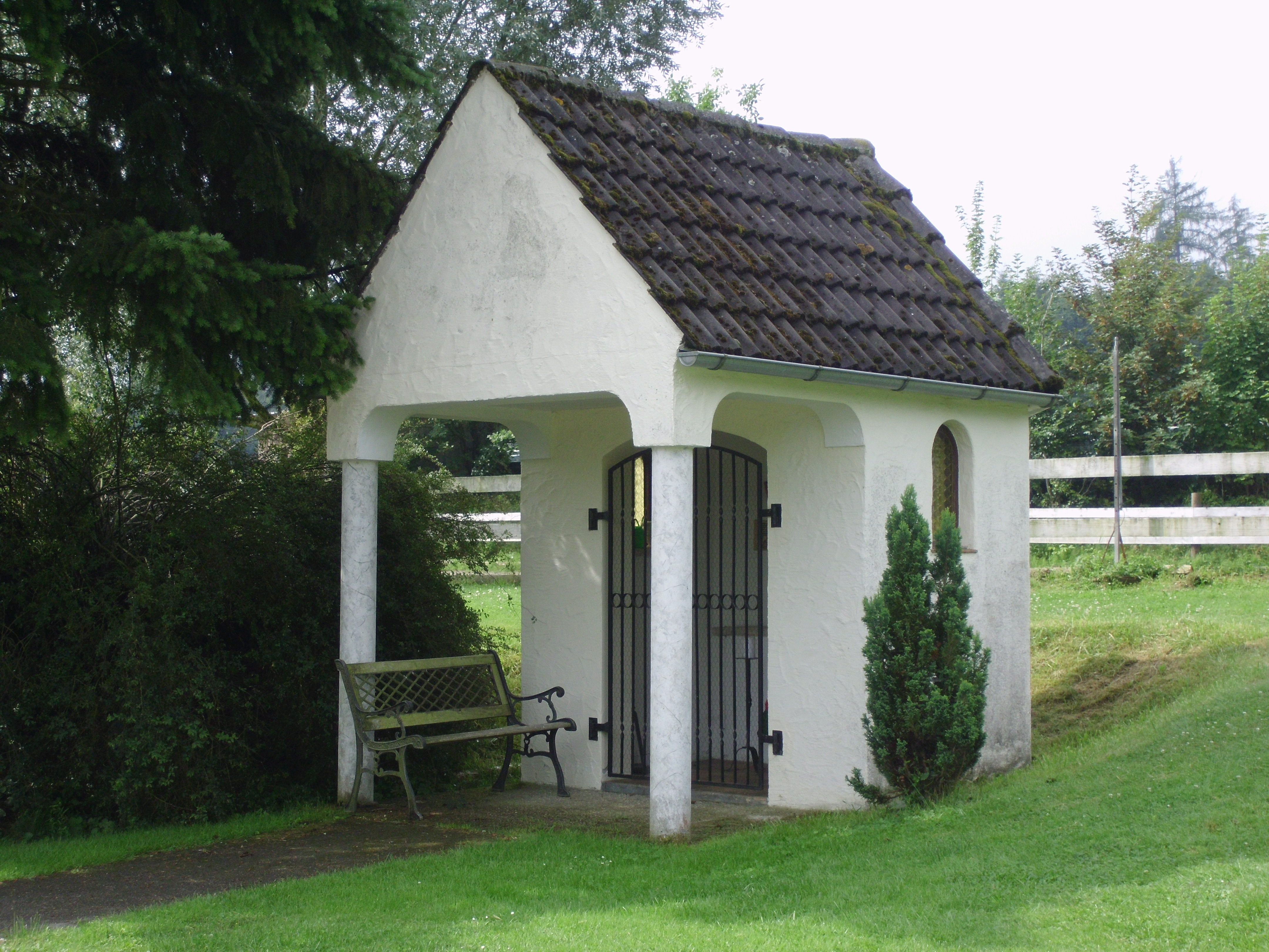 Wolpertsau, Gemeinde Rennertshofen im Landkreis Neuburg-Schrobenhausen, Hofkapelle